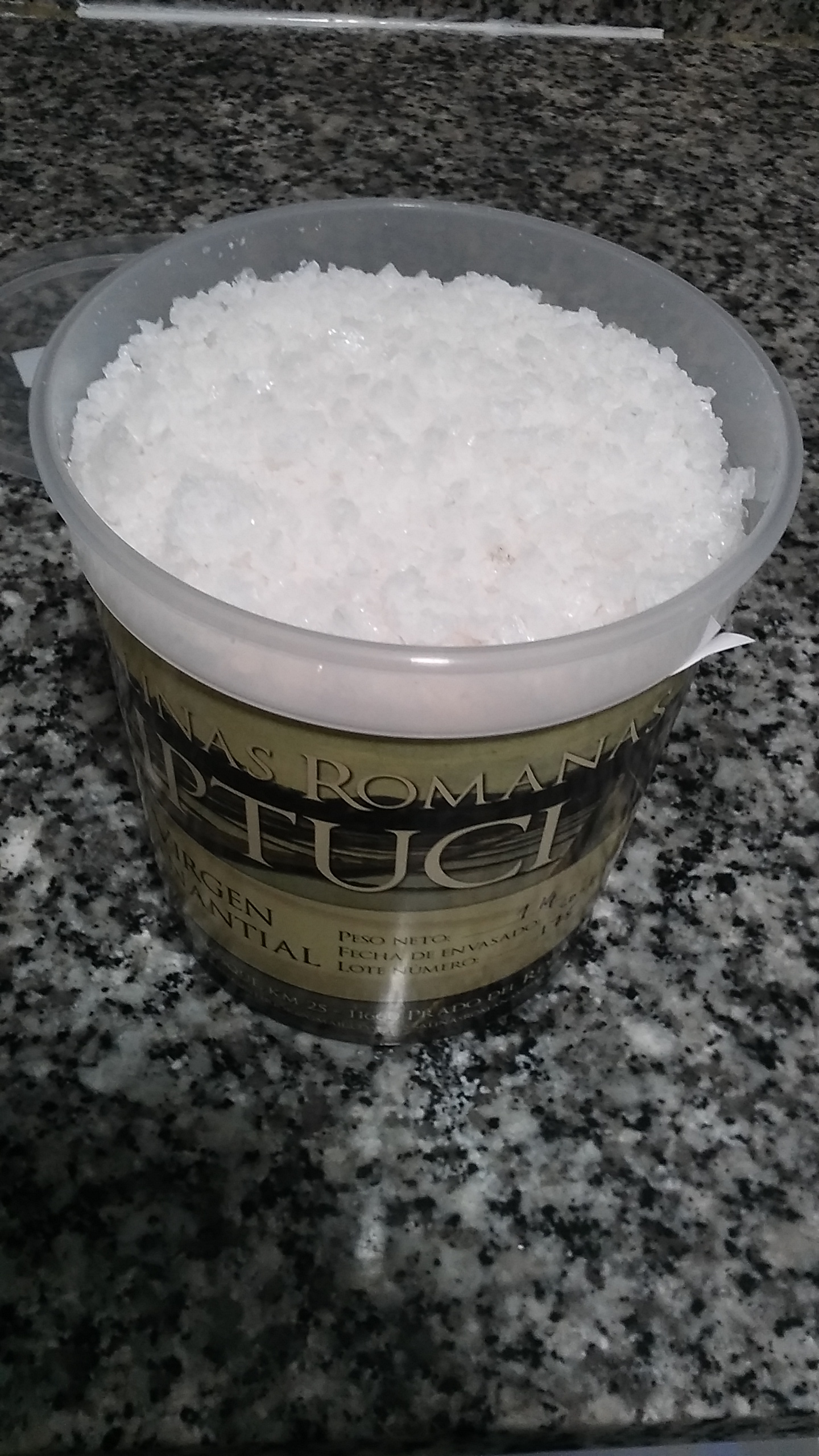 sal de las Salinas de origen romano de Iptuci. Andalucía, España